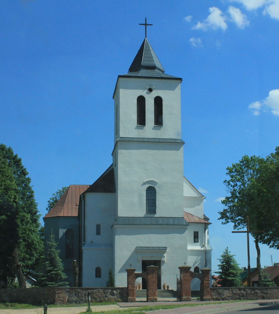 Kościół pw. św. Jana Apostoła w Nurze